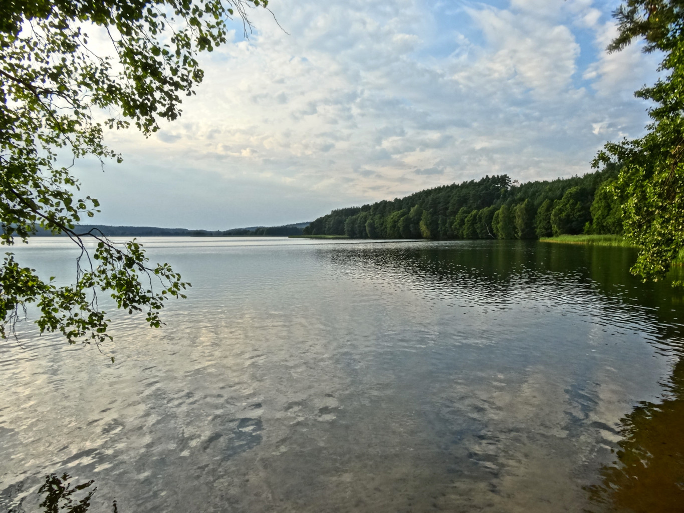 Płęsno - jezioro w gminie Brusy na obszarze Zaborskiego Parku Krajobrazowego (widok z Drzewicza)